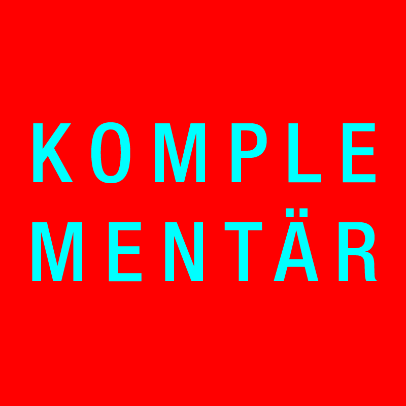 Darstellung von den Komplementärfarben mit Schrift in Cyan auf Rot.